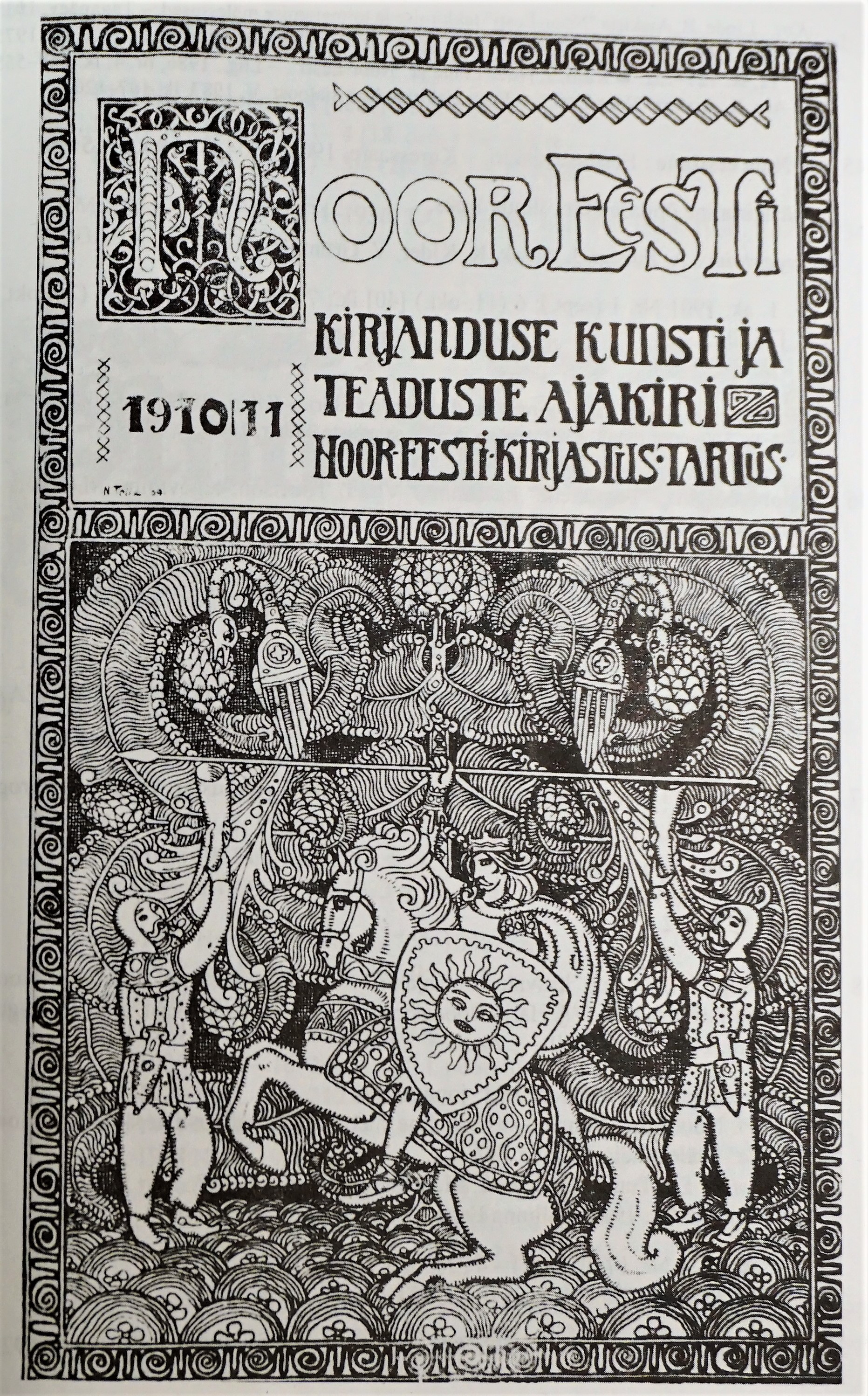 Nikolai Triik - Noor-Eesti 1910 esikaas.